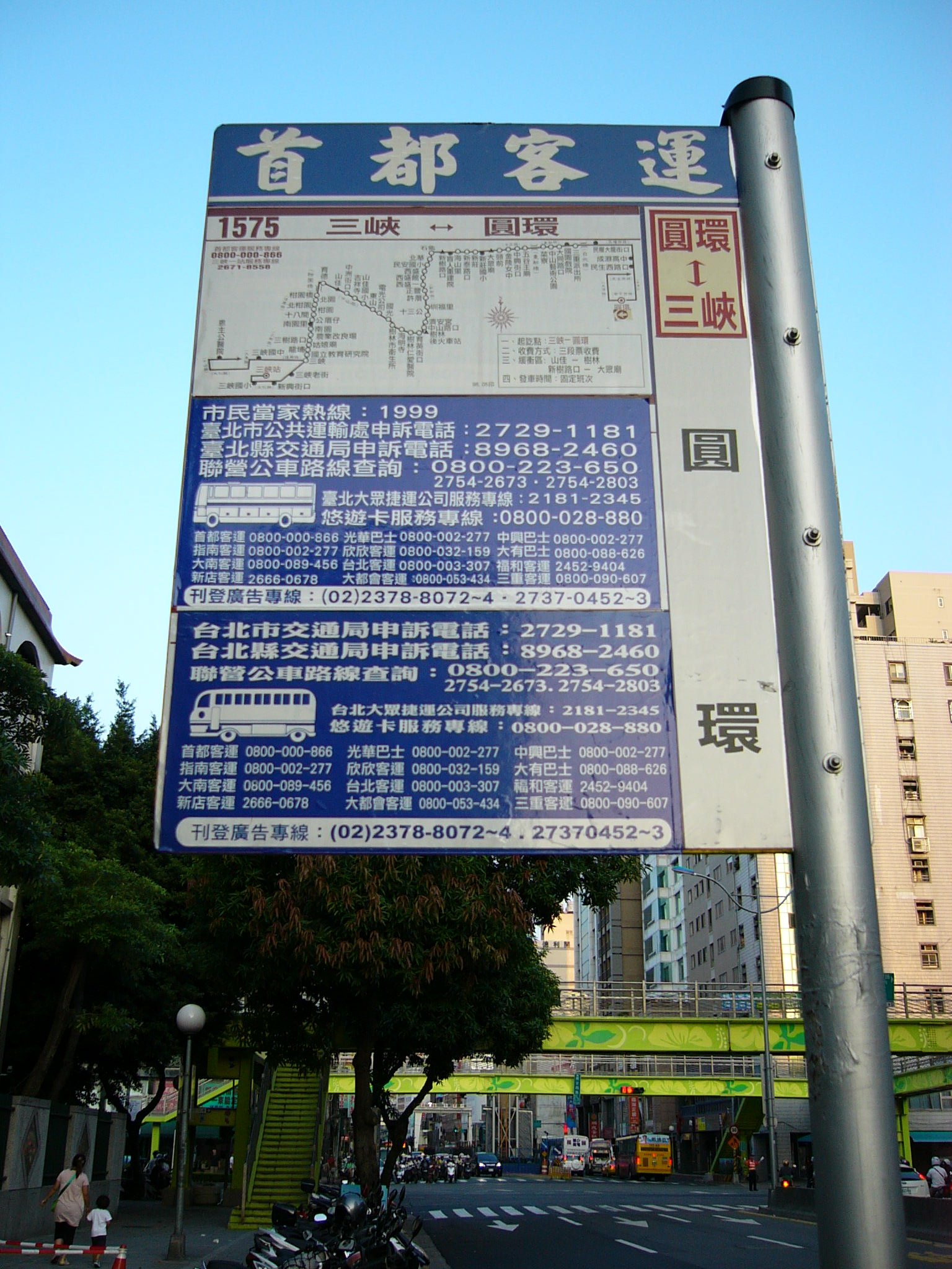 首都客運「圓環」站牌，位於臺北市大同區南京西路，得名於建成圓環，現已拆除。